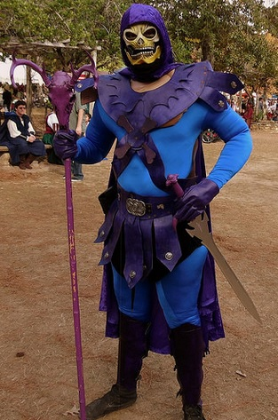 Cosplayer personificando a Skeletor